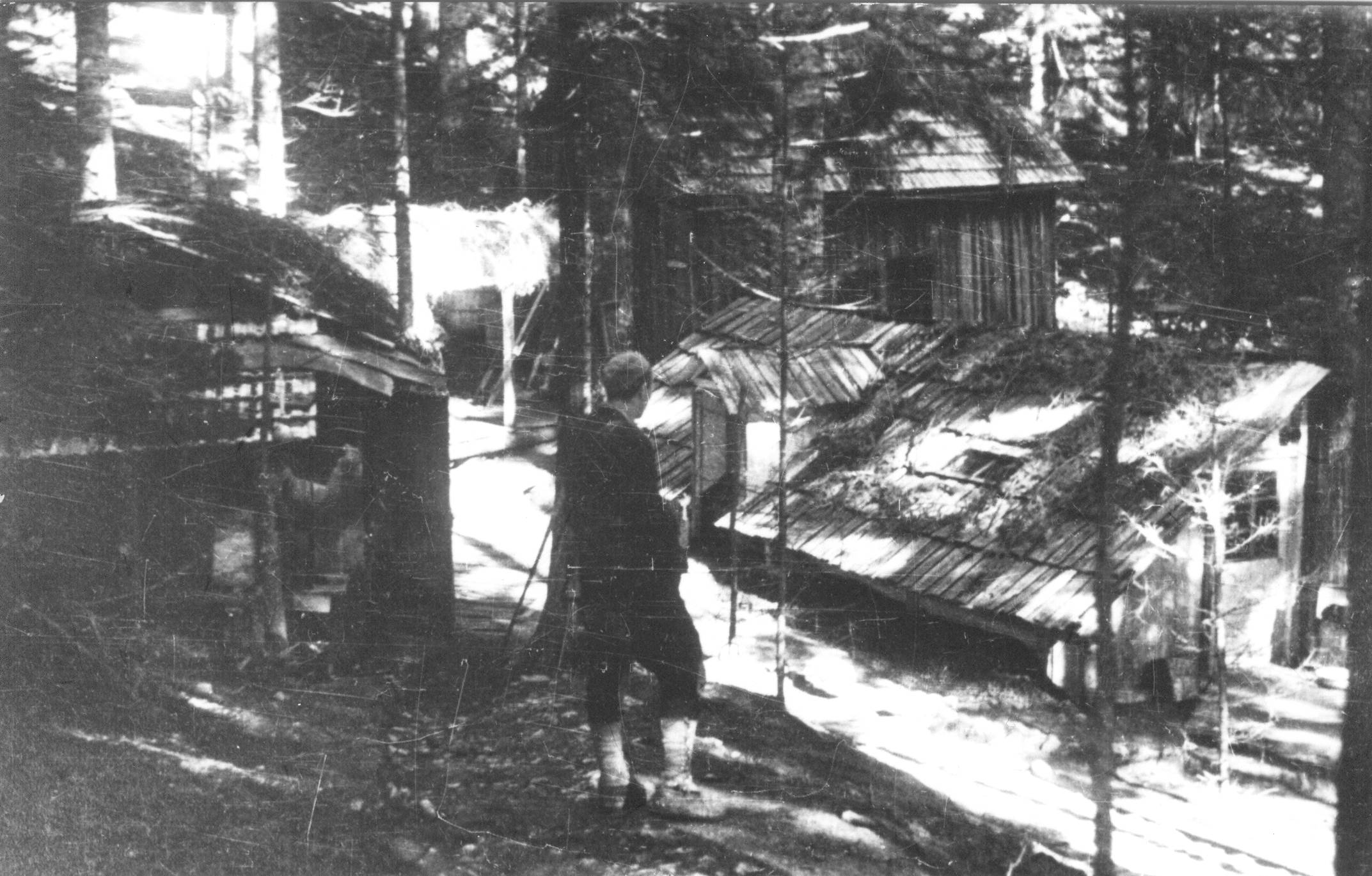 Partizanska bolnišnica Lesen kamen v Kočevskem Rogu.